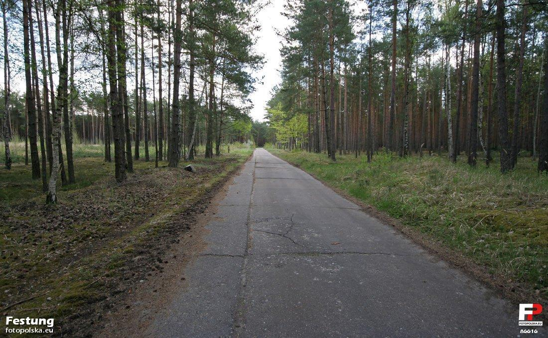 Widoczna na zdjęciu betonówka jest jedną z setek innych dróg komunikacyjnych, szatkujących rozległy teren fabryki w Christianstadt.